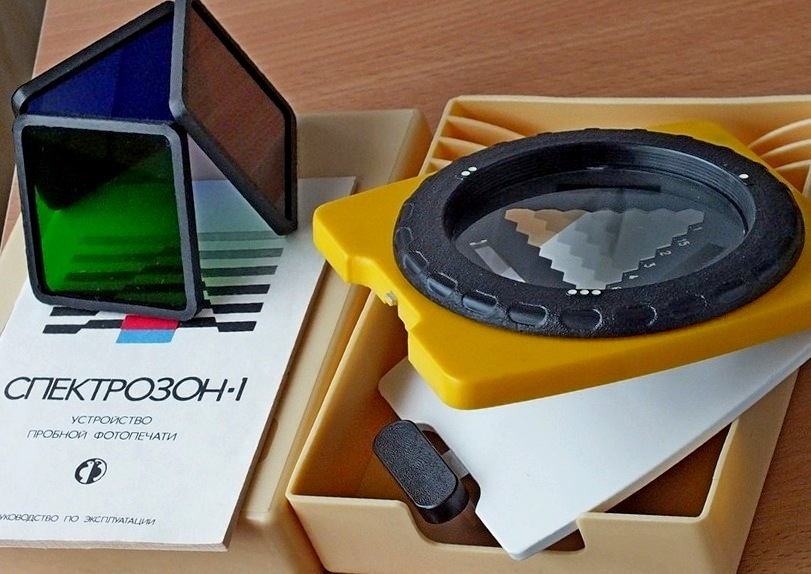 Спектрозон-1 предназначался для пробной фотопечати цветных и черно-белых снимков и позволял точно определить выдержку при печати и подобрать корректировочные светофильтры.